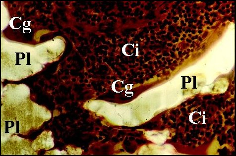 Réaction granulomateuse autour d'une prothèse en polycel fragmentée. Vue en lumière polarisée.